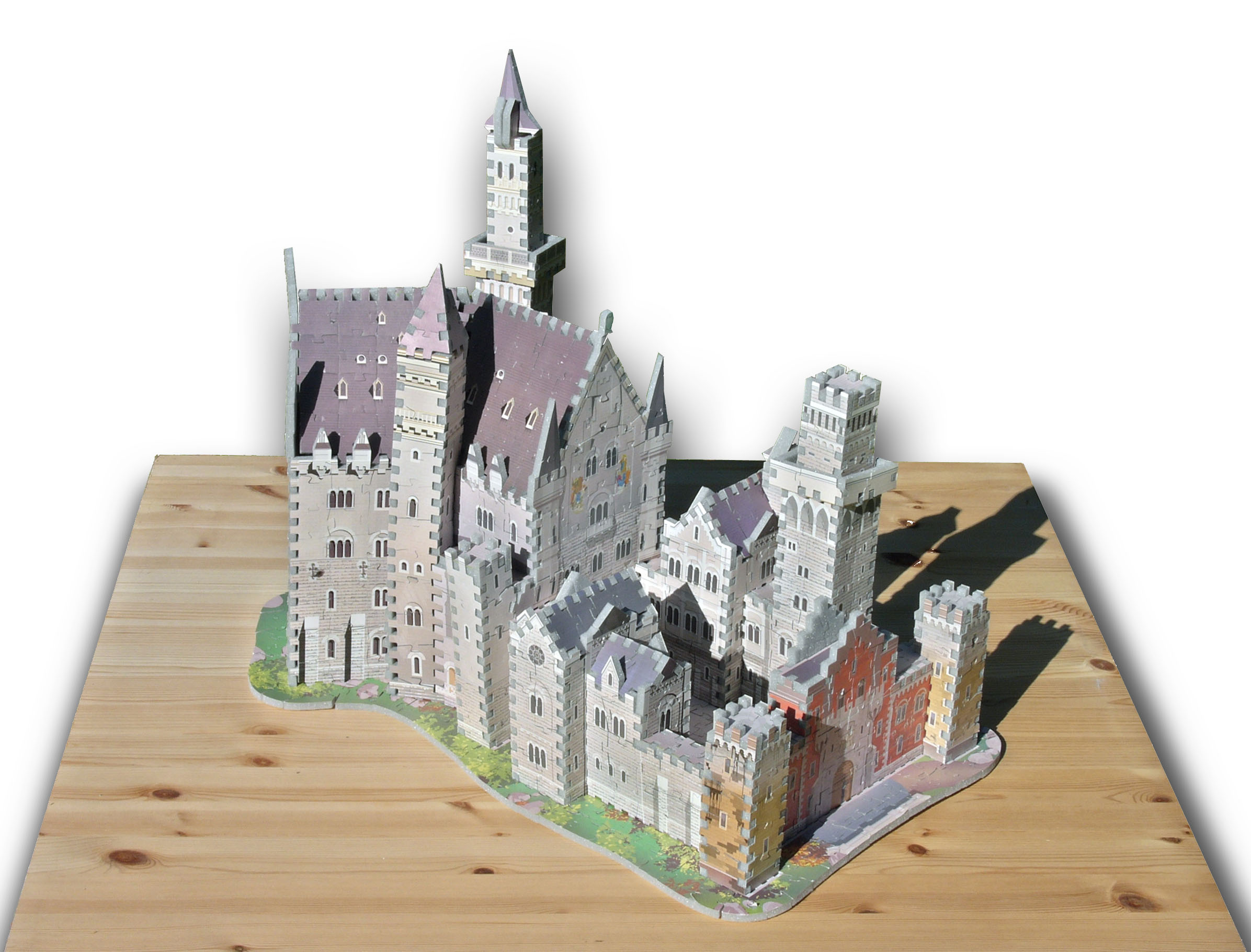 3D-puzzle of castle Neuschwanstein (Bavaria); 1000 pieces